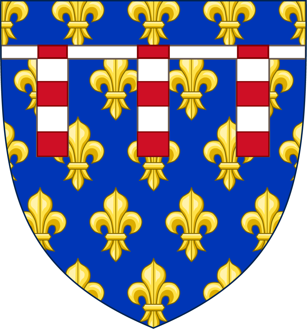 Blason de Philippe de France, comte de Poitou.